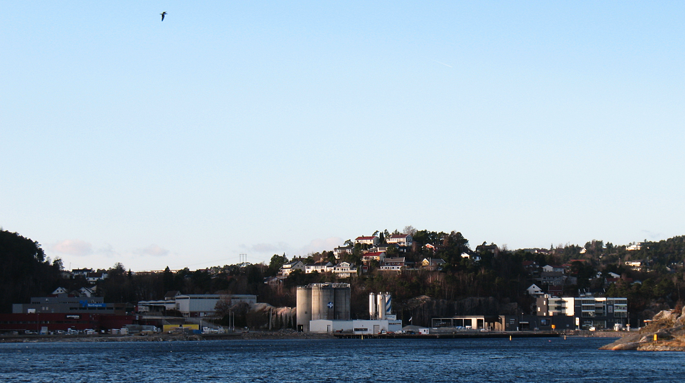 Industriområdet i Urvika og boligområdet på Kongsgård sett fra Torsvikveien over Topdalsfjorden.